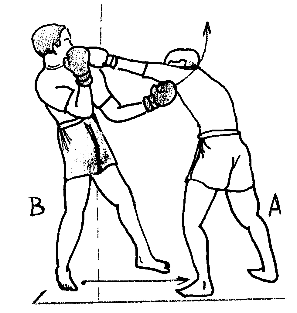 retrait2.jpg